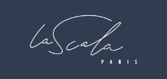 Logo Scala_fond bleu